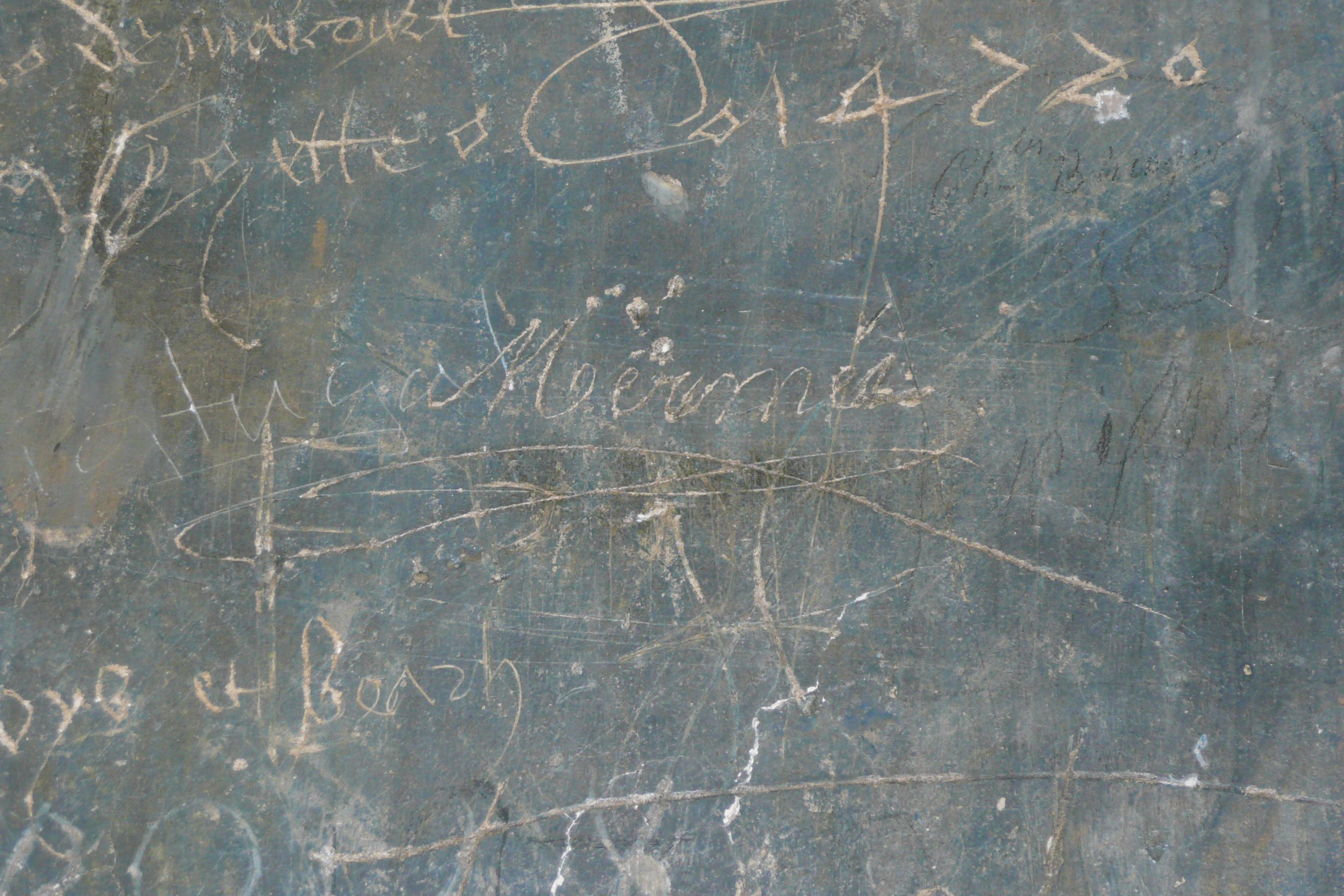 Photo du graffiti gravé au canif par Prosper Mérimée dans la chapelle saint martial du Palais des Papes d'Avignon. Il se trouve sur le mur nord, au niveau du soubassement orné d’arcatures trilobées simulées.